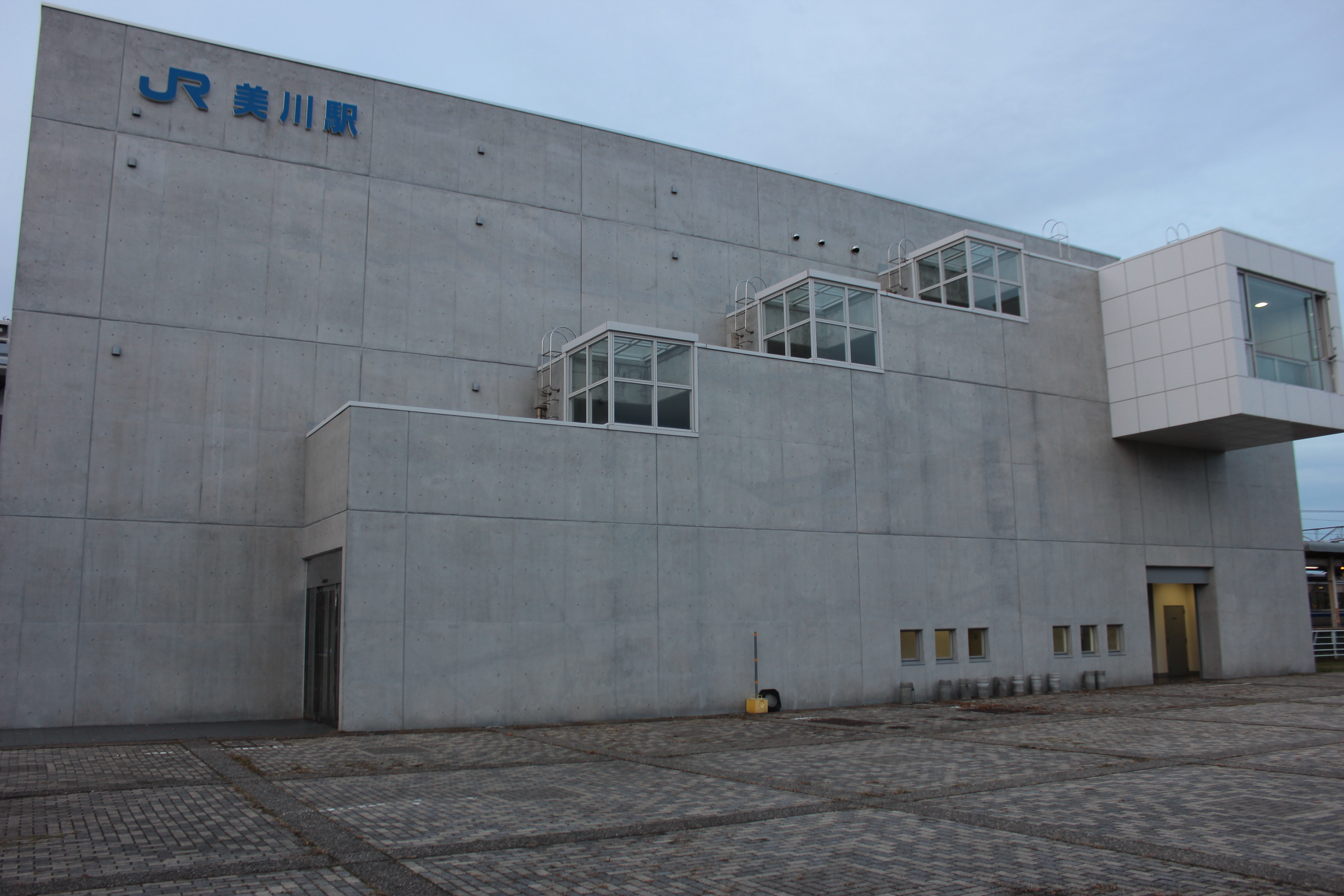 美川駅（石川県白山市、白山広場側） Canon EOS Kiss X5